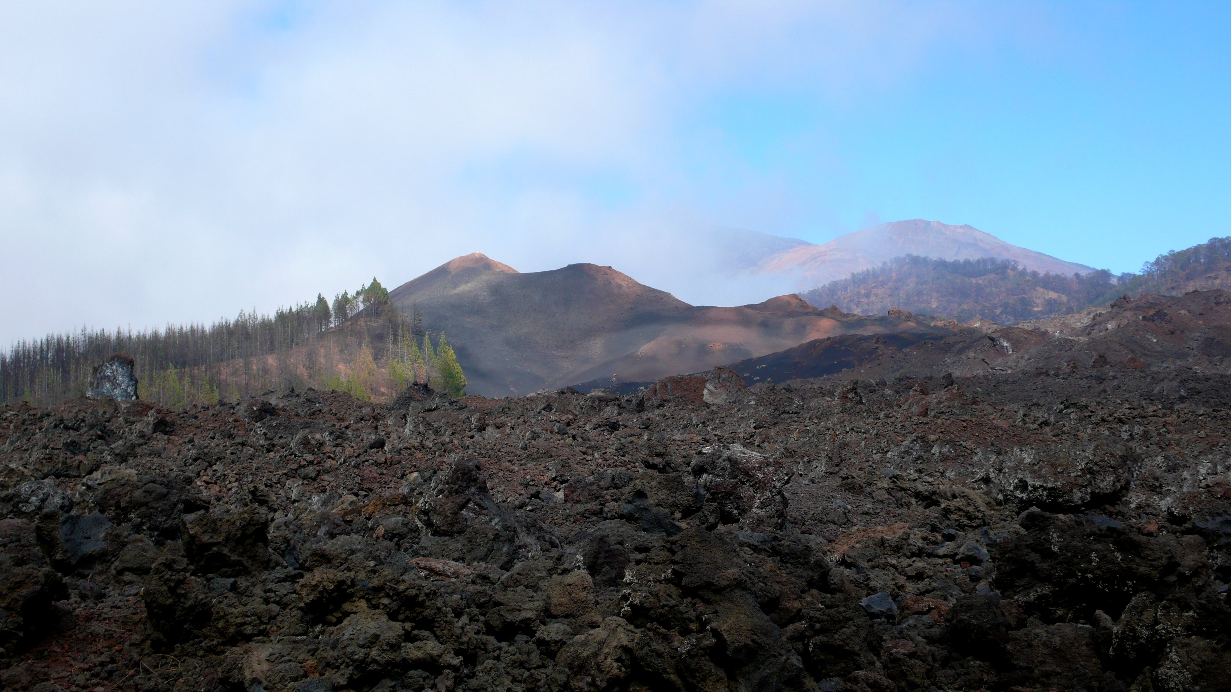 Volcán Chinyero, Tenerife. En primer término, campos de lavas de sus erupciones. Al fondo, entre nubes, los volcanes Teide y Pico Viejo.